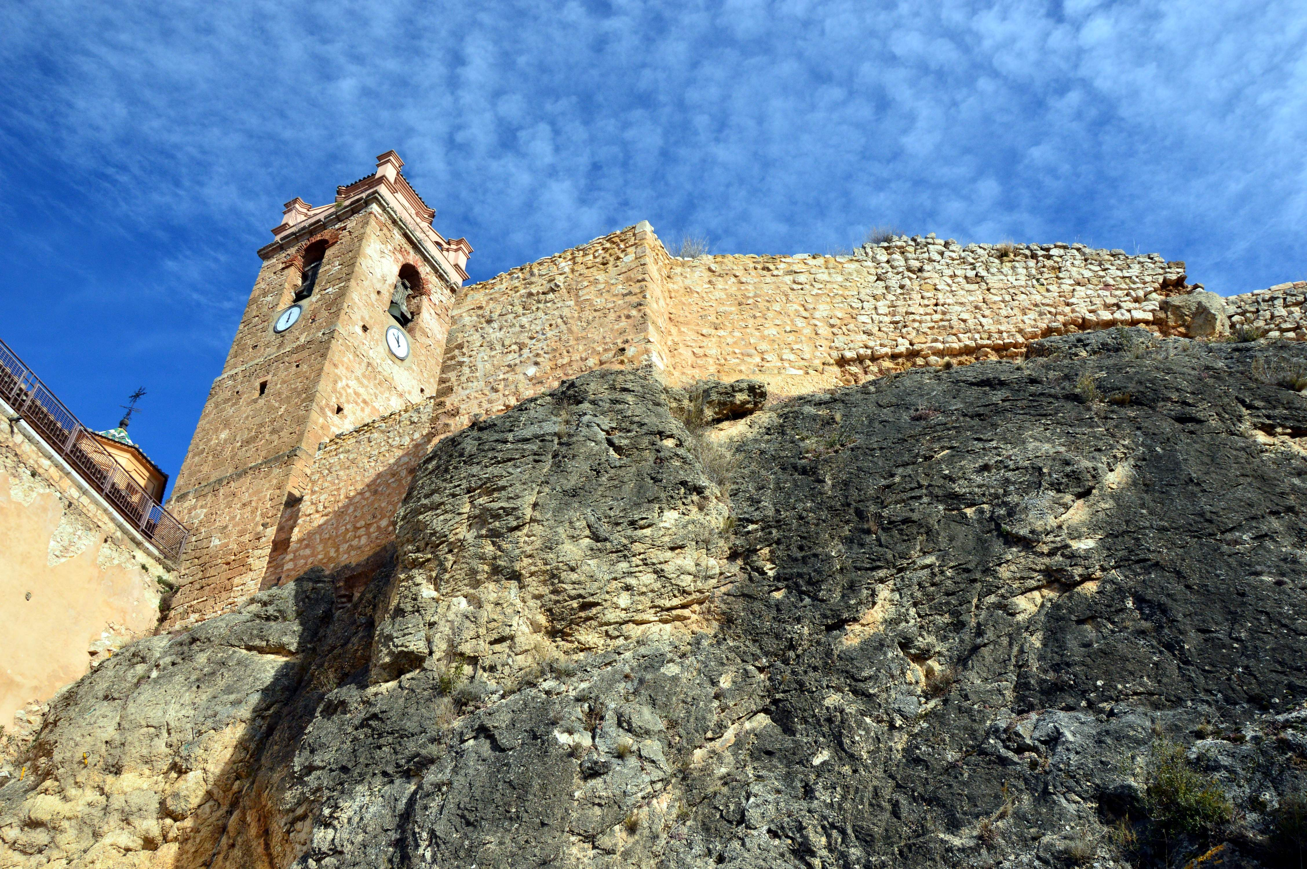 Iglesia-fortaleza de Castielfabib (Valencia), con detalle del campanario donde se hace el volteo humano (2019).